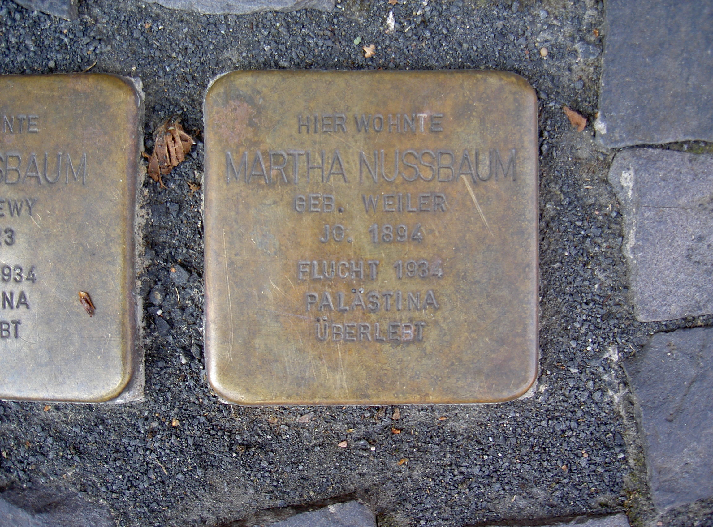 Stolpersteine in Vacha Martha Nussbaum